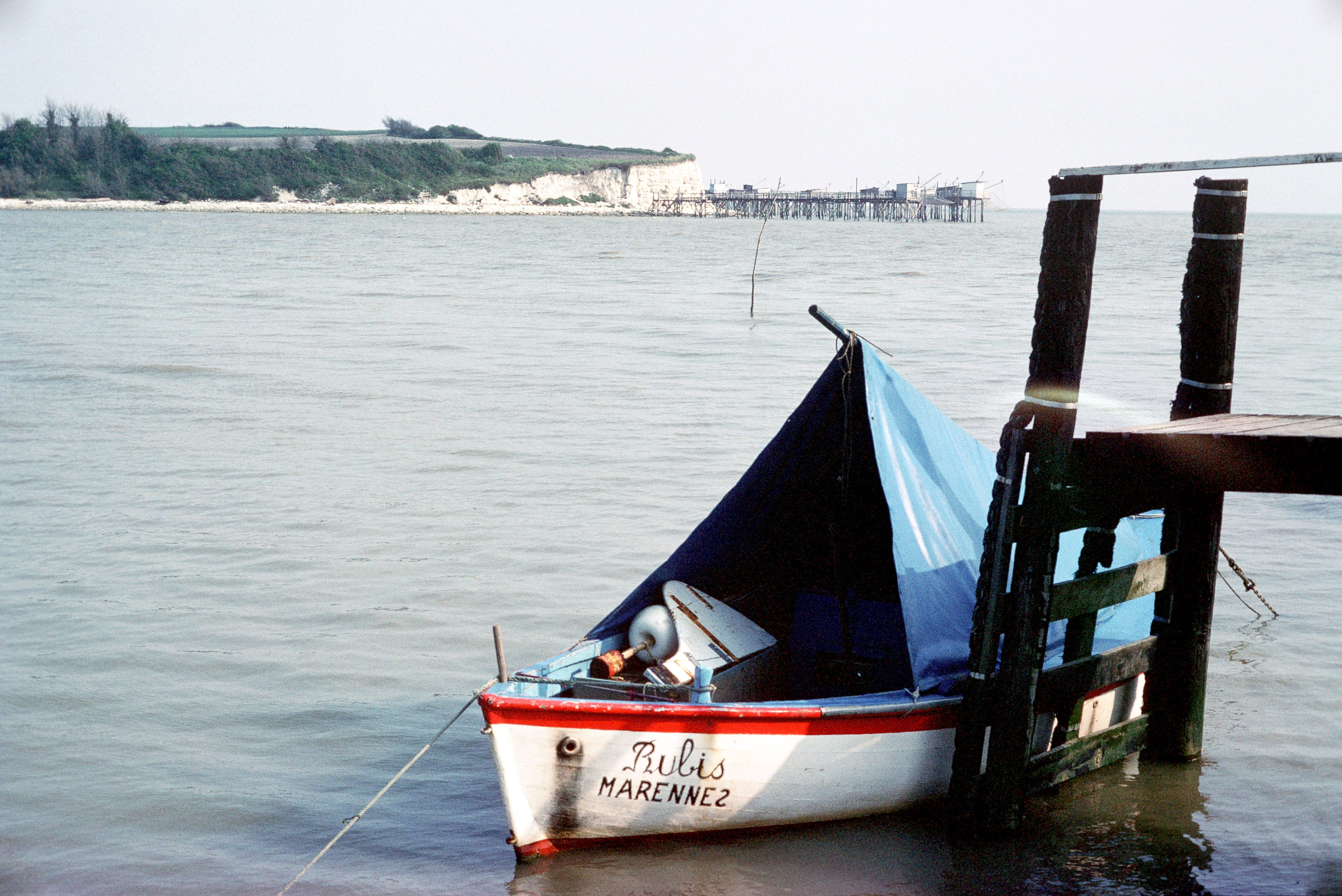 La yole de pêche « Rubis » amarrée devant un ponton sur pilotis du port de Talmont-sur-Gironde en 1980. Ce type de bateau est encore utilisé pour pêcher les espèces de poissons migrateurs telles que le maigre. Il est une embarcation traditionnelle de l’estuaire de la Gironde. La toile triangulaire (de couleur bleue sur cette yole) qui permet au pêcheur de s'abriter s'appelle un "taud". Cette yole est immatriculée à Marennes. En arrière plan, on peut voir les carrelets à longues passerelles de la pointe de Cornebrot (de la Falaise du Caillaud) tels qu’ils étaient avant la très violente tempête « Martin » du 27 décembre 1999 qui les a détruits. Certains ont été reconstruits depuis. Talmont-sur-Gironde, Charente-Maritime, France.